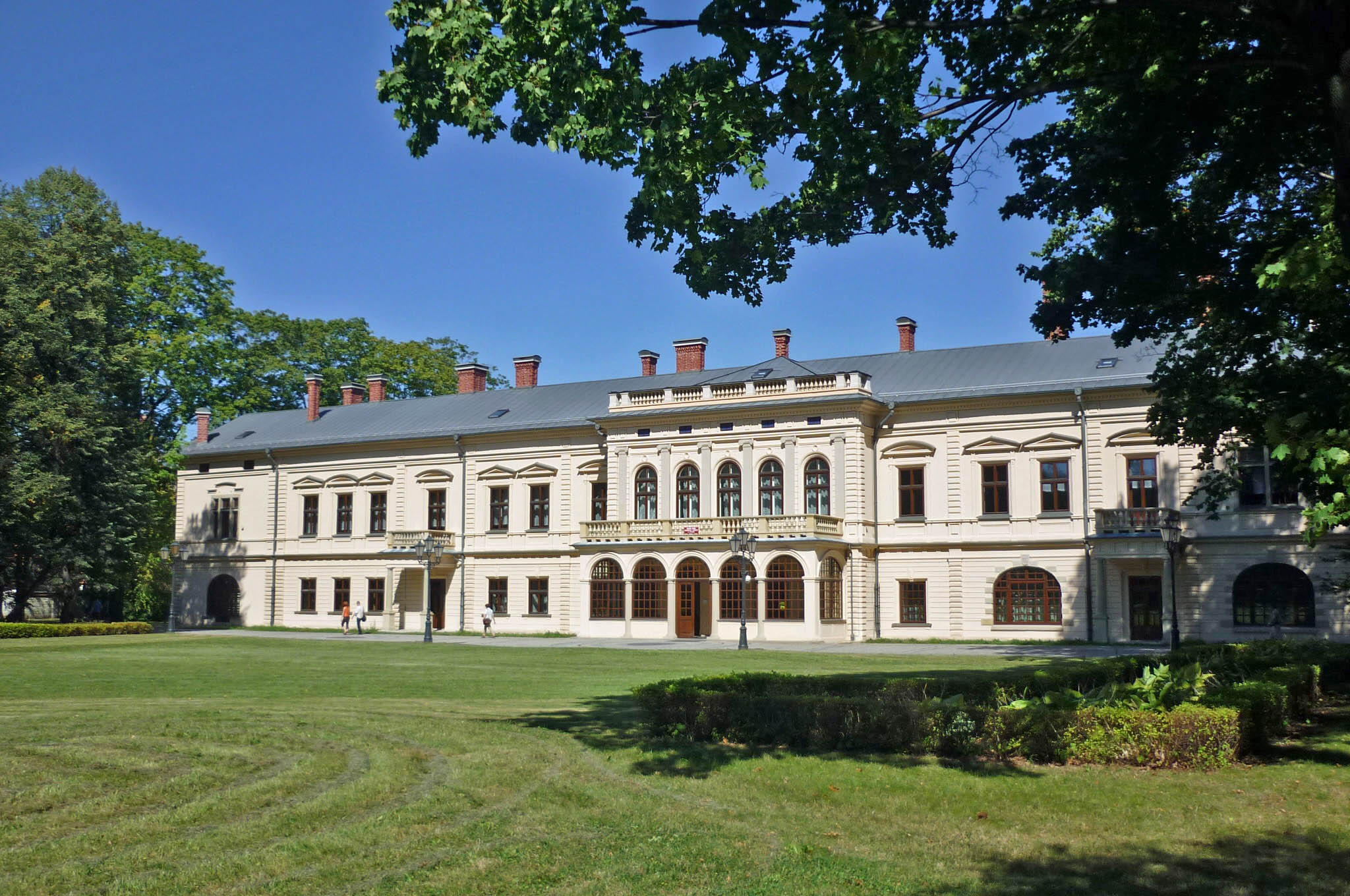 Habsburger-Schloss in Saybusch (Żywiec)